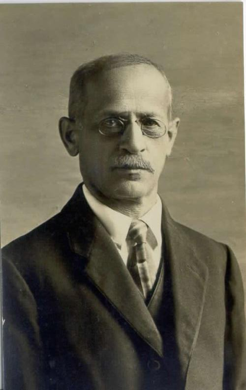 Fran Maselj - Podlimbarski (1852-1917), Slovene writer and officer.